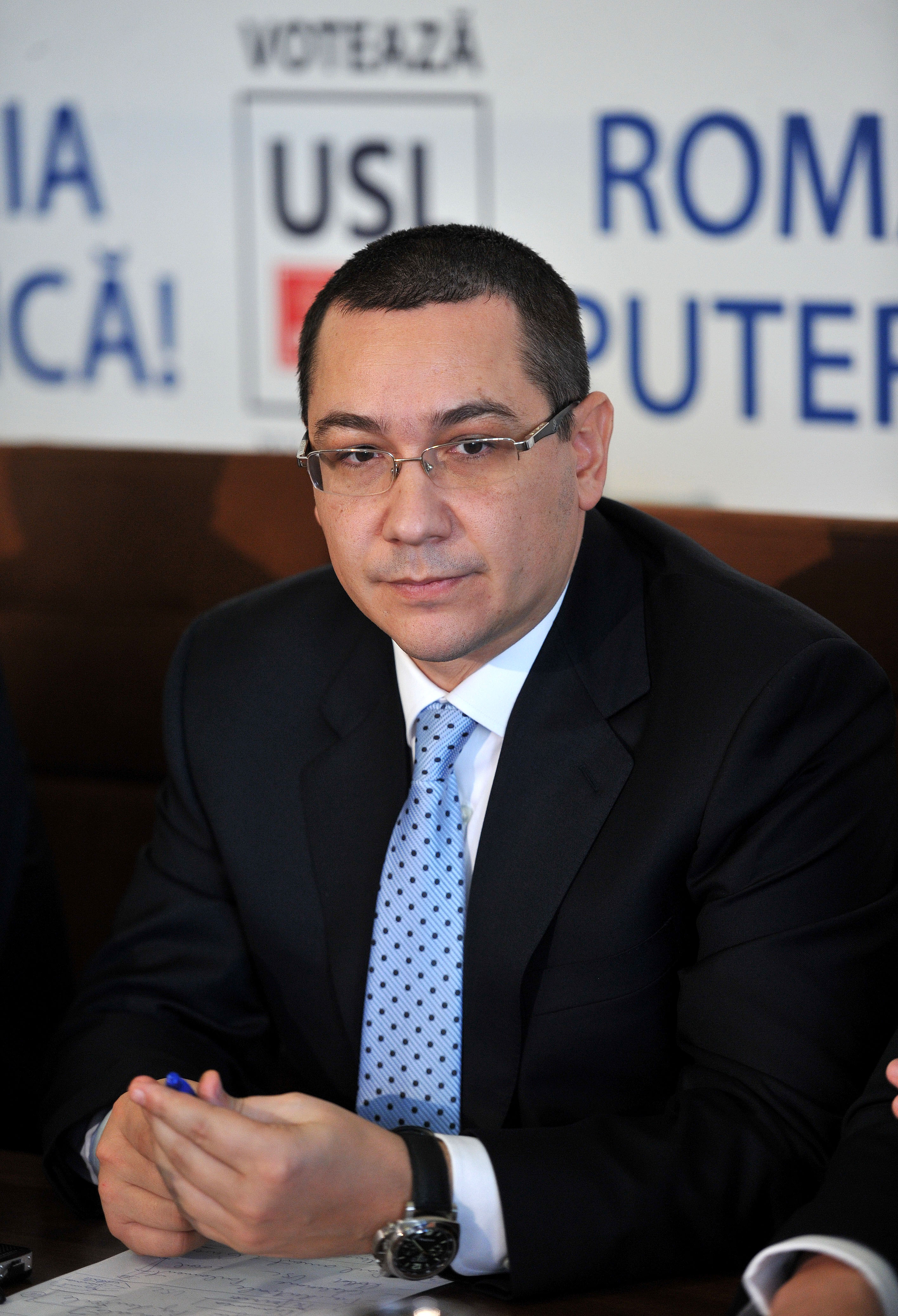 Victor Ponta la reuniunea USL - 13.01.2014 (5)